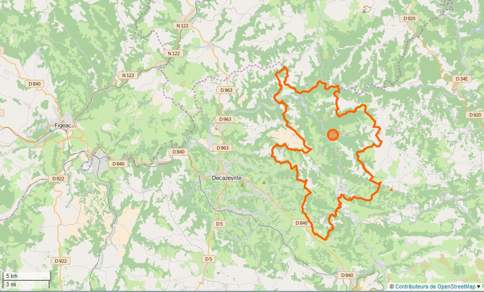 Conques-en-Rouergue Limite communale This map may be incomplete, and may contain errors. Don't rely solely on it for navigation.